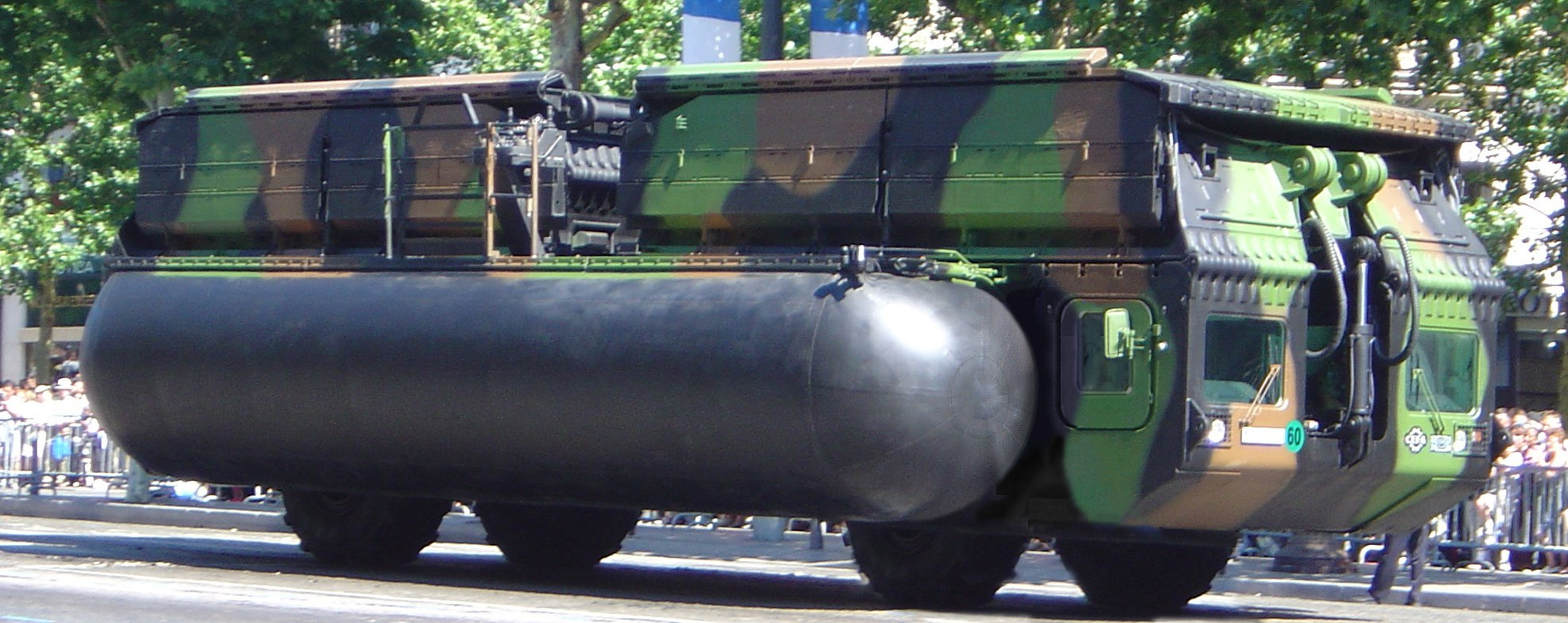 Mobile field-deployable bridge (EFA) of the engineers of the French Army official page Photo taken during the July 14, 2003 military parade on the Champs Élysées (unfortunately a put his head in front of the camera...) Copyright © 2003 David Monniaux Note : La photo a été modifié. Le CRS a été supprimé. L'image d'origine est disponible ici